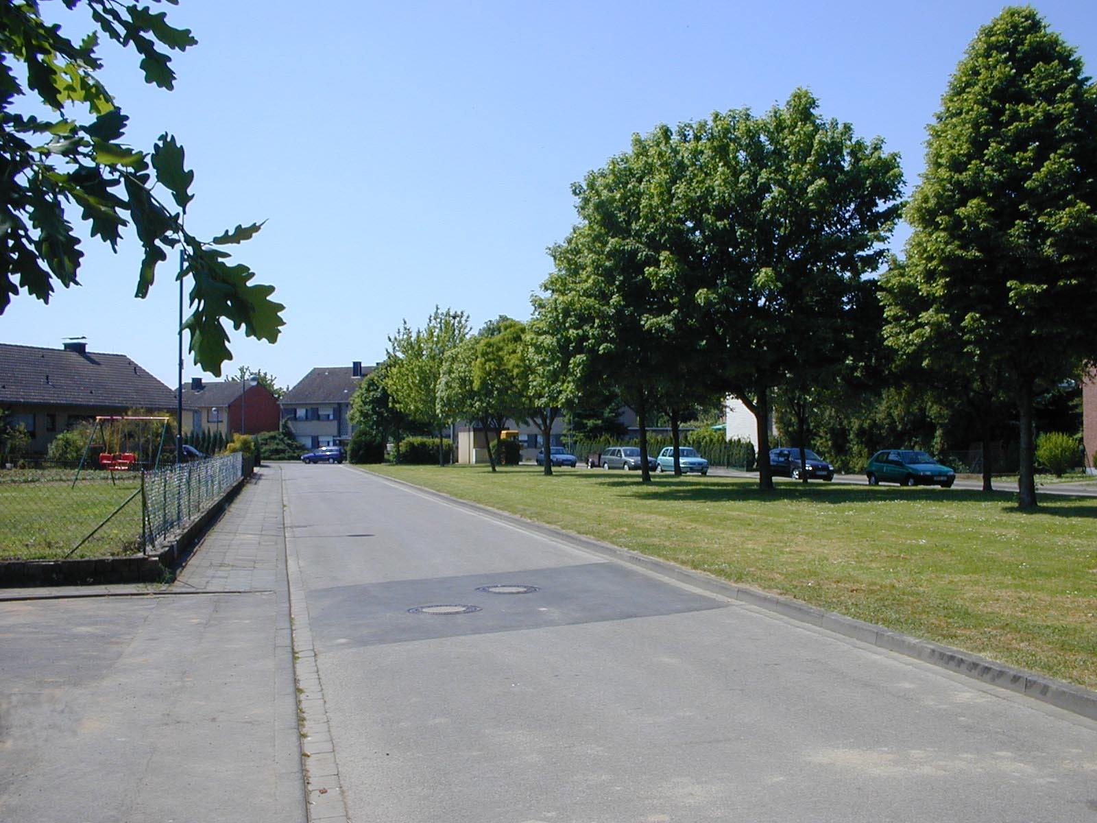 freigegeben durch das Presseamt der Gemeinde Nörvenich am 09.02.05, GNUF